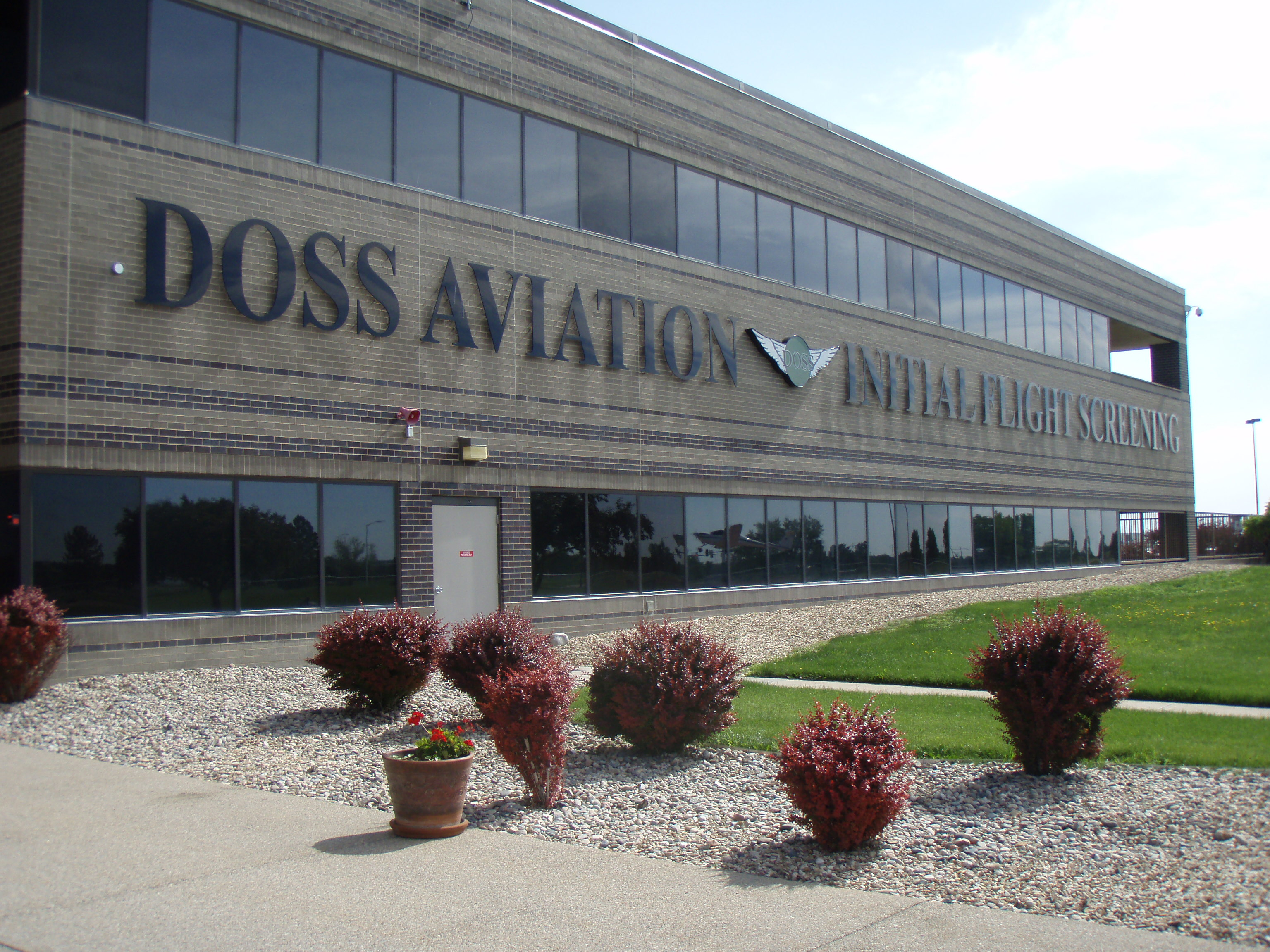 DOSS IFS